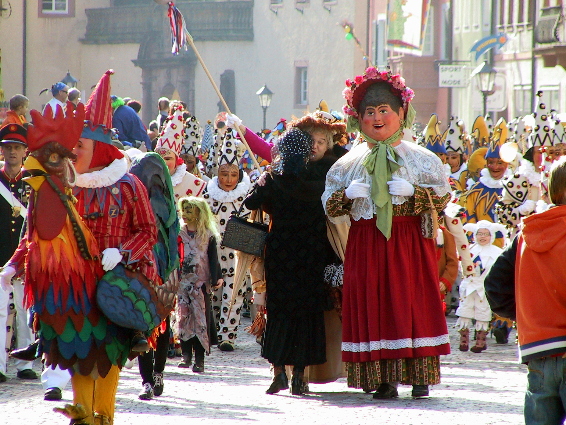 Spitze des Kinderumzuges in Wolfach / Schwarzwald am Fastnachts-Dienstag 2007